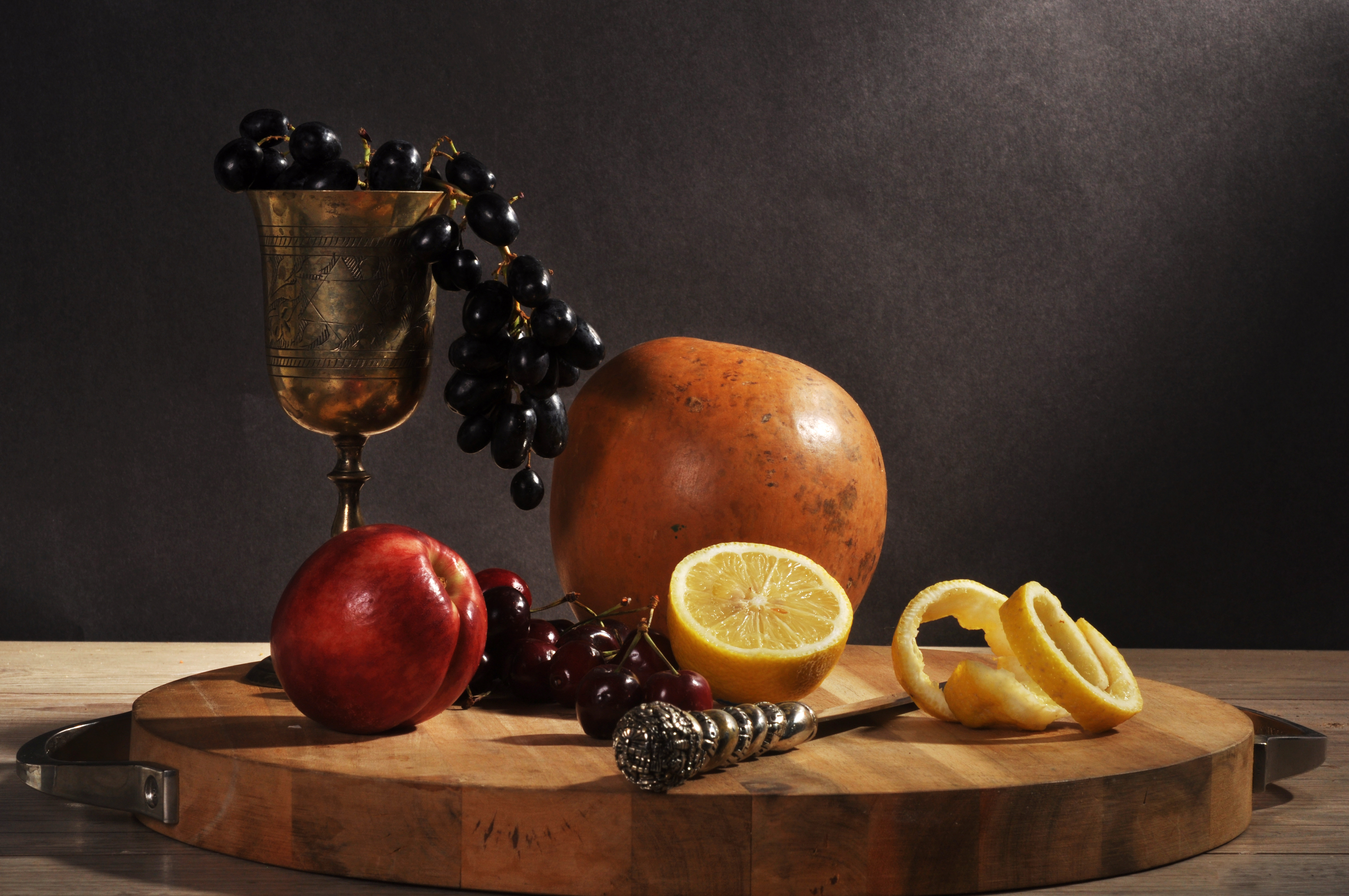 טבע דומם אלרז כהן תיכון רוטברג